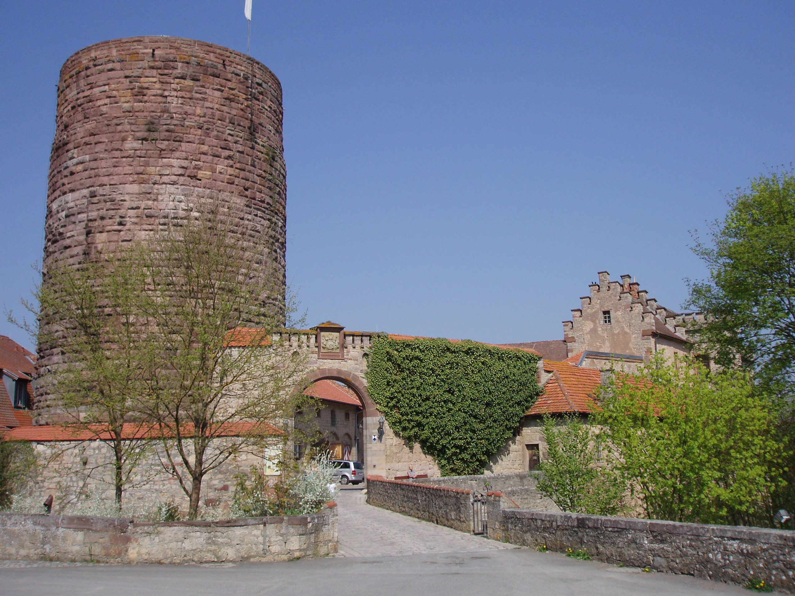 Bergfried im Schloss Saaleck